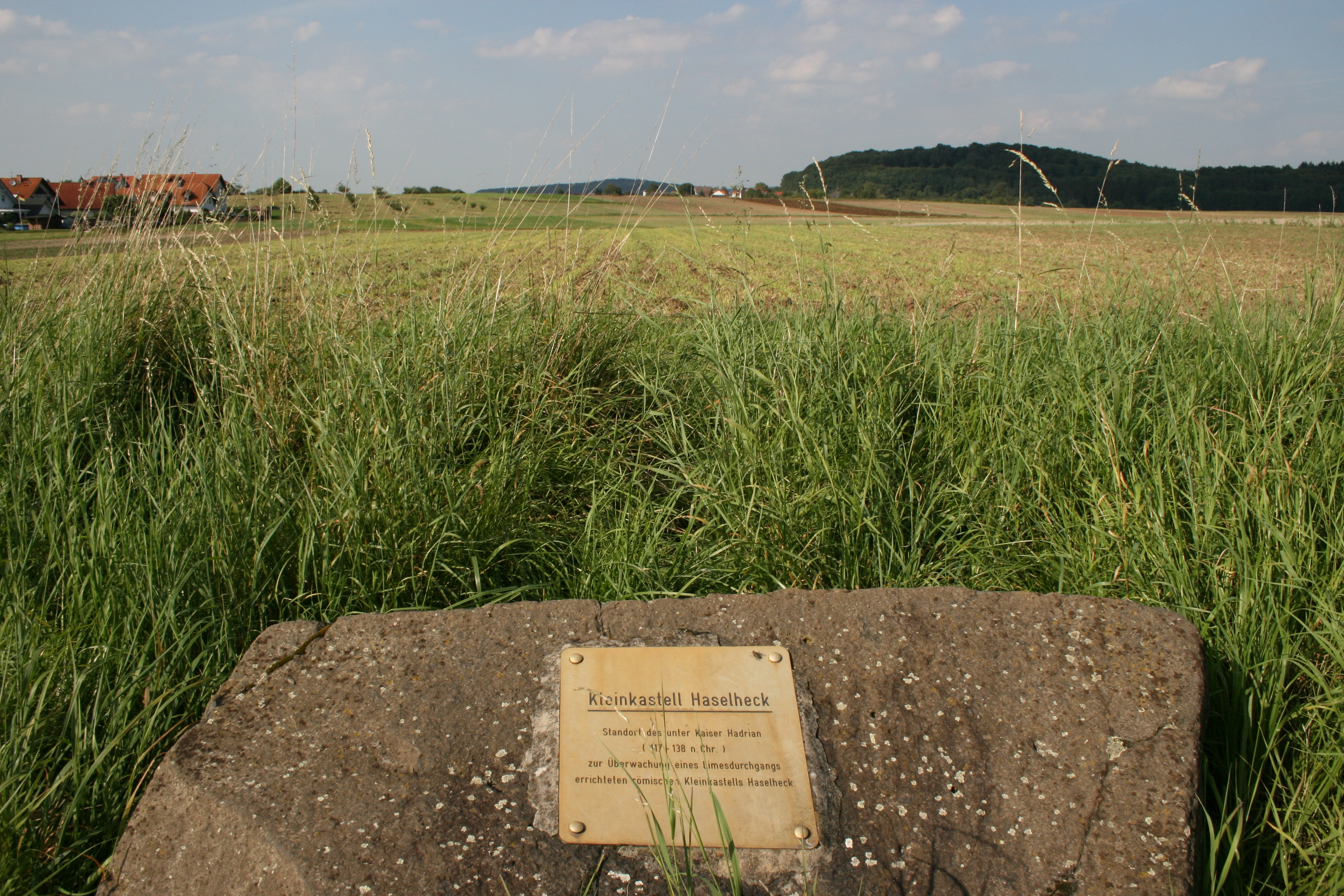 Kleinkastell Haselheck bei Echzell, Situation 2007.